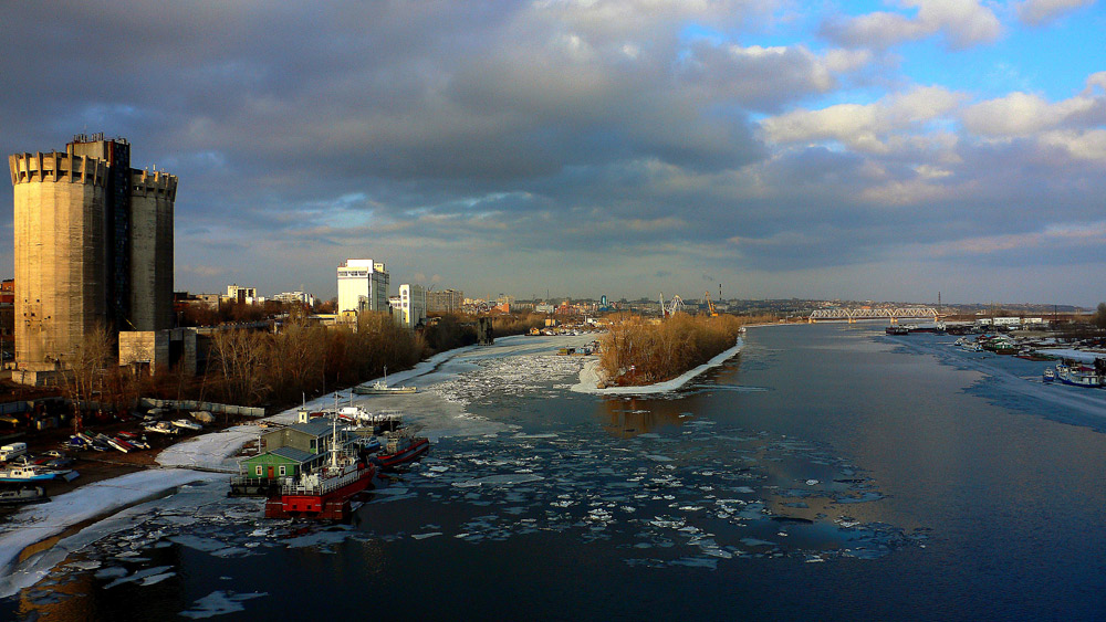 Город Самара. Река Самара со стороны устья.